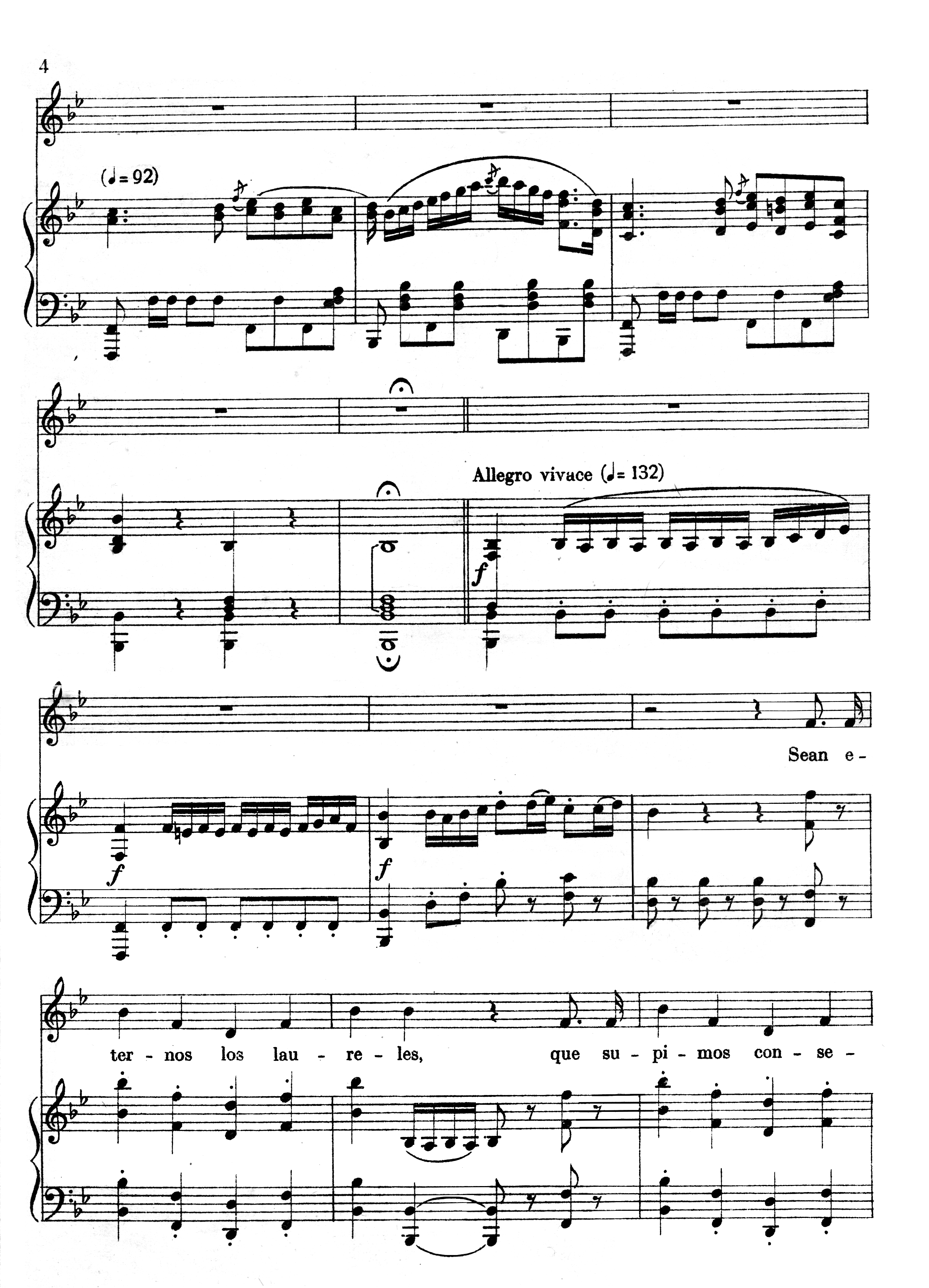 Partitura canto y piano Página 4/5